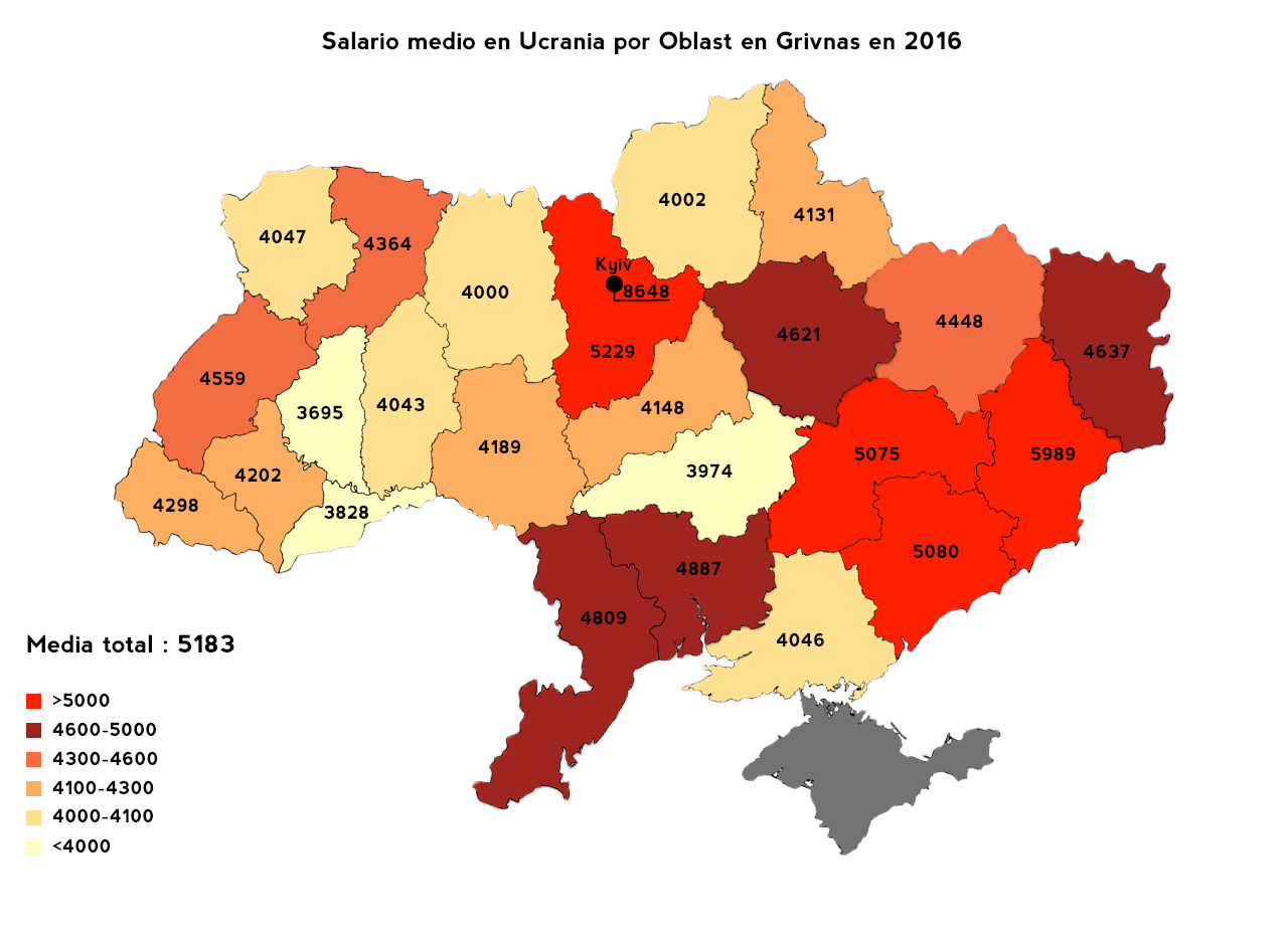 Salario medio de ucrania dividido por óblast y la capital en el año 2016 , como fuente he tomado una imagen como esta en ucraniano y la he traducido y rehecho.